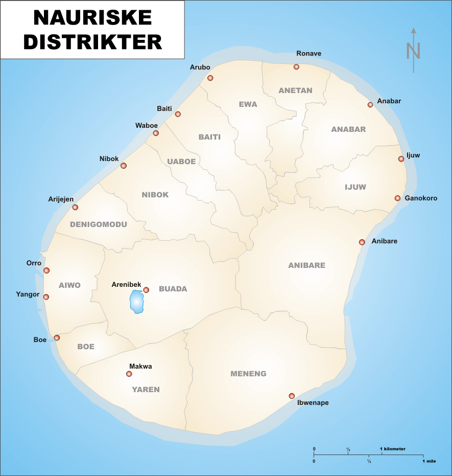 Kart over Naurus distrikter.